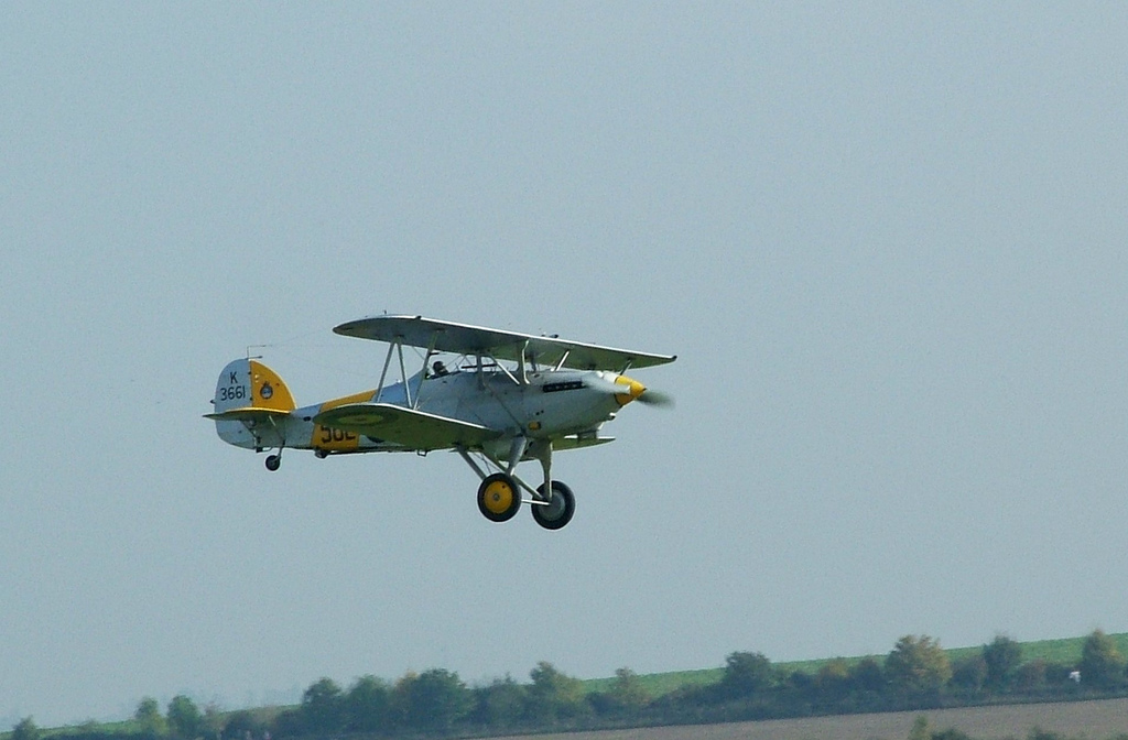 Il Nimrod in volo.